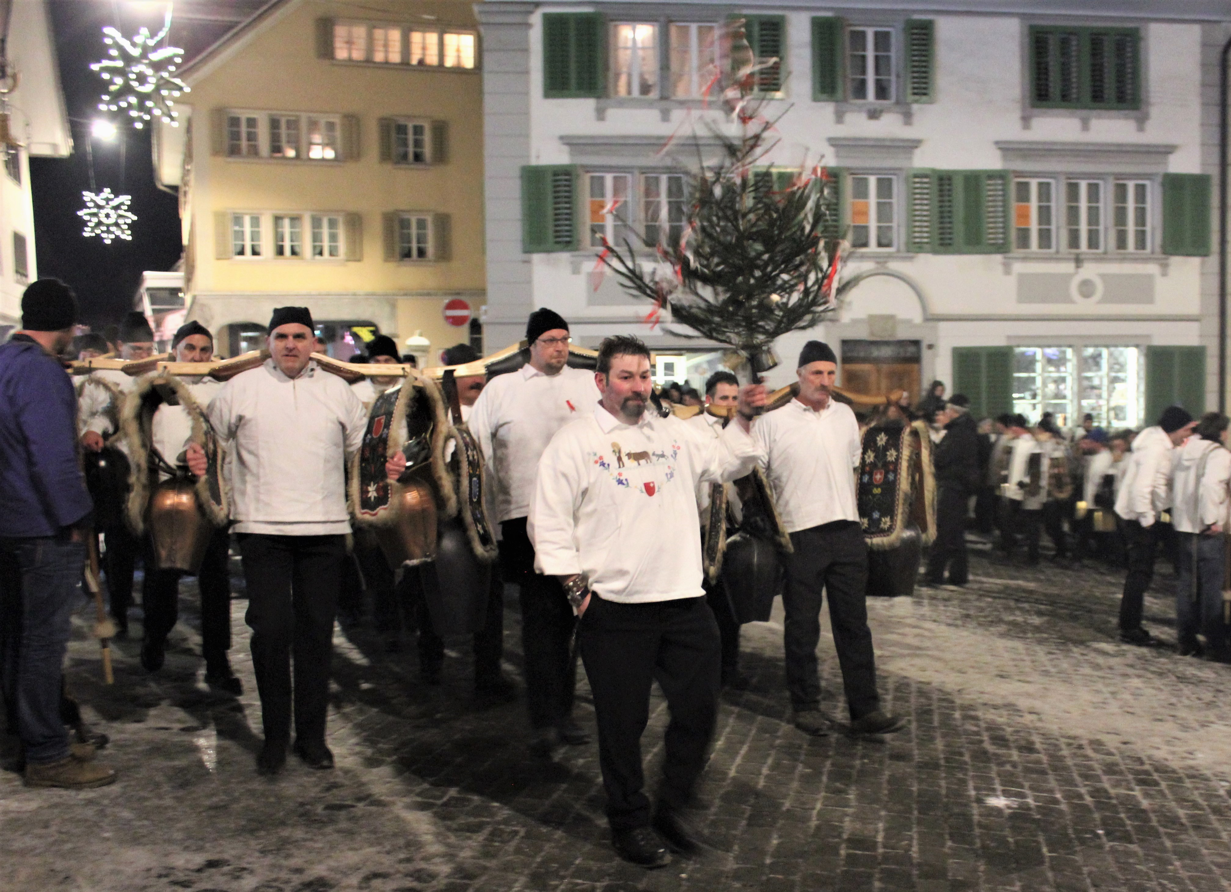 Einzug der Schwyzer Greifler auf den Hauptplatz in Schwyz am Dreikönigsabend 2017